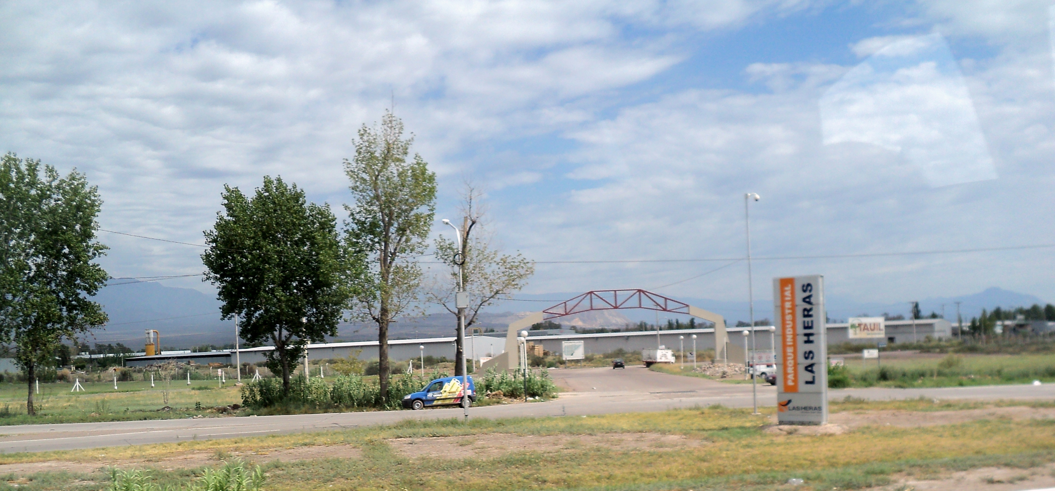 entrada a las heras